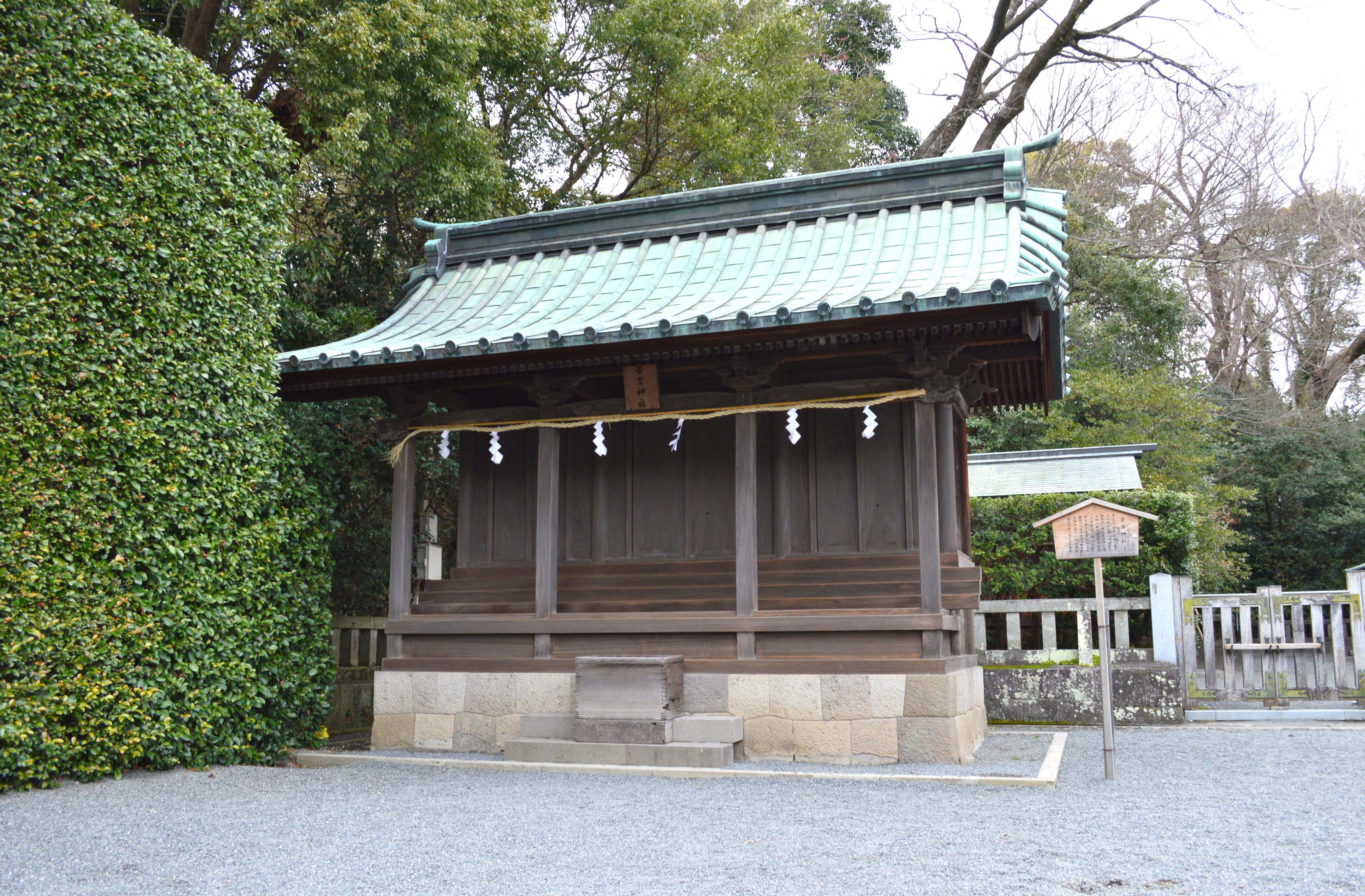 三嶋大社境内摂社 若宮神社